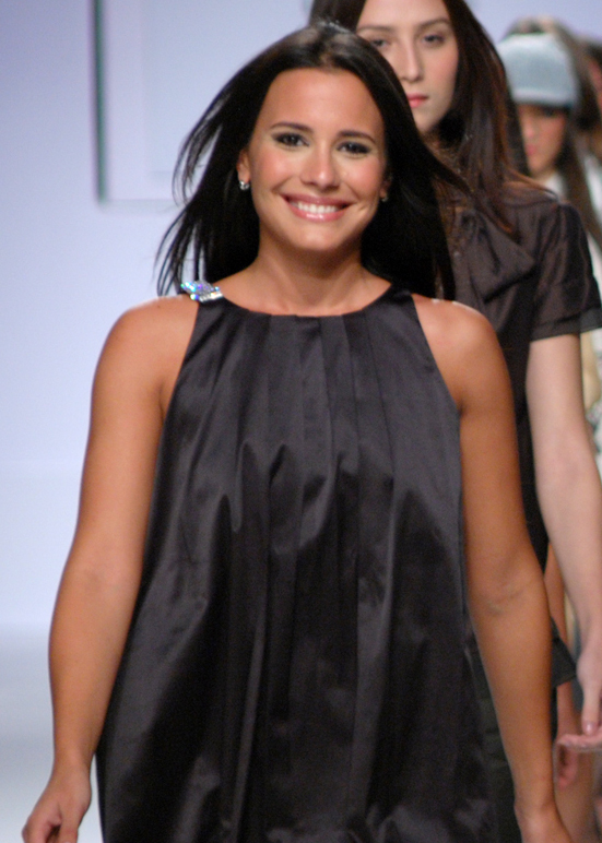 Juliana Knust @ Vivo Park Fashion.